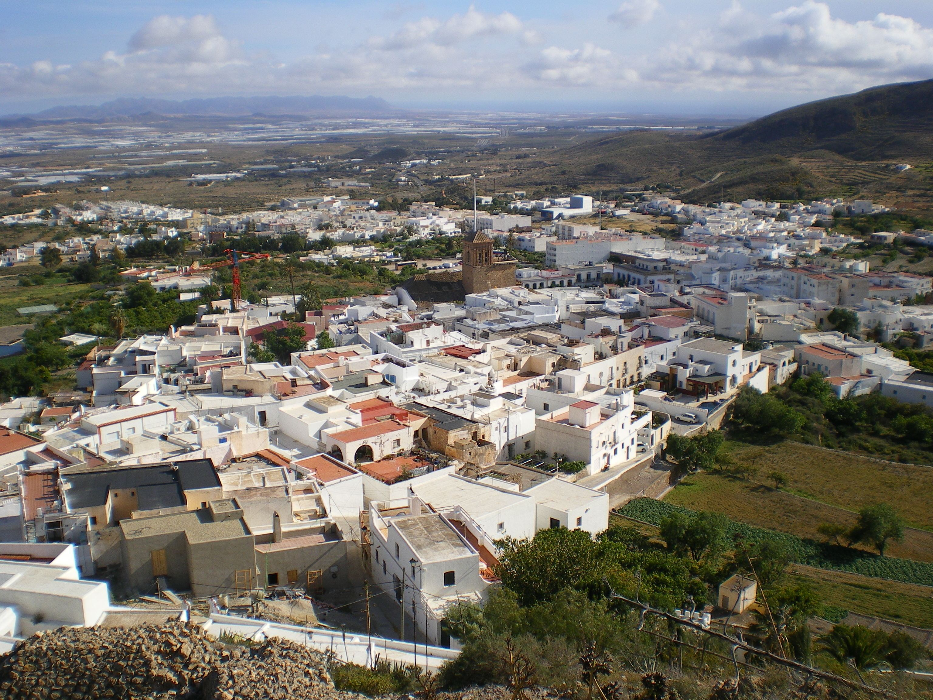 Fotografía de vista general de Níjar, en Almería (España), desde la atalaya hacia el sur.